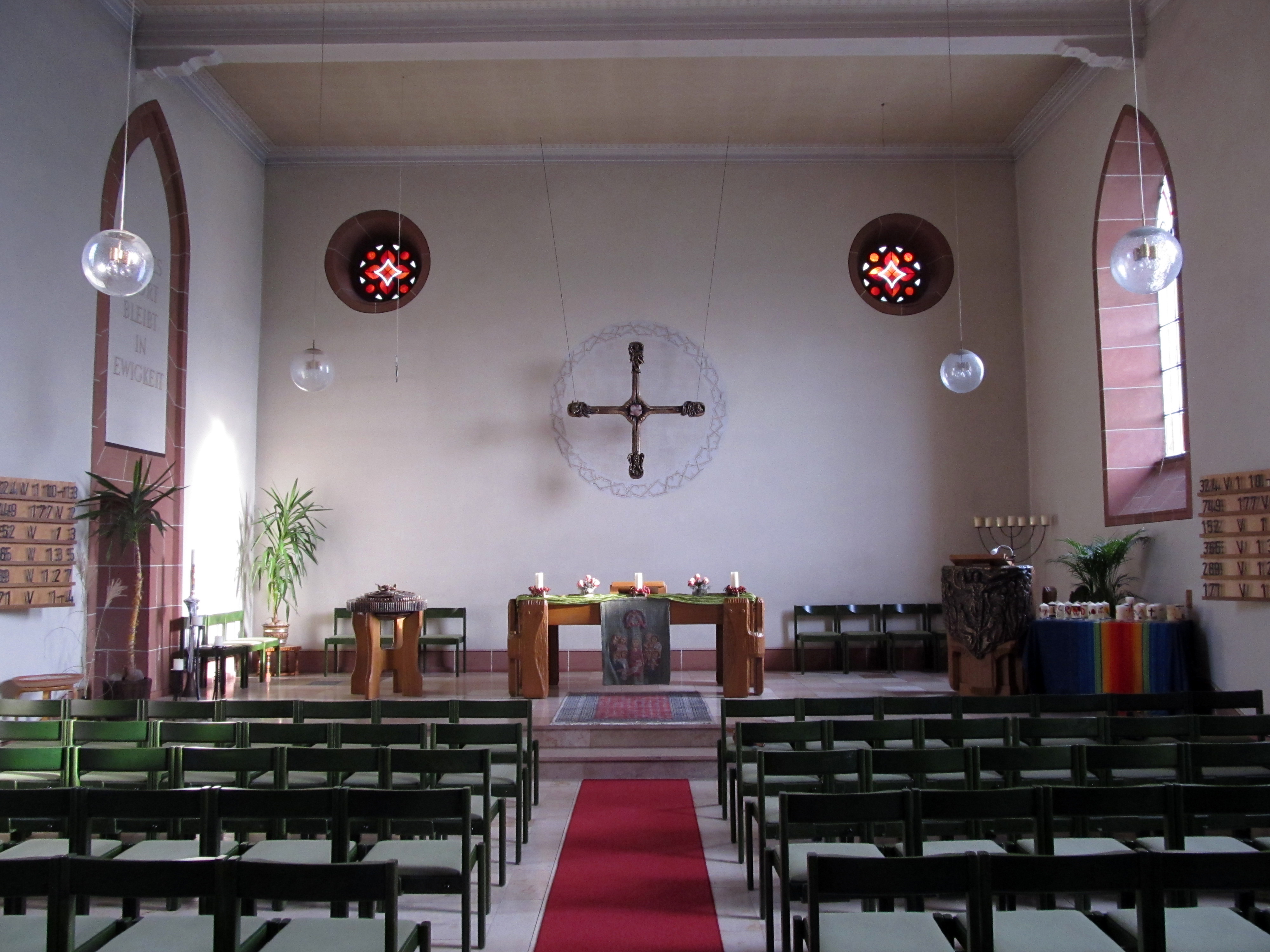 Blick ins Innere der protestantischen Apostelkirche in Einöd, einem Stadtteil von Homburg, Saarland